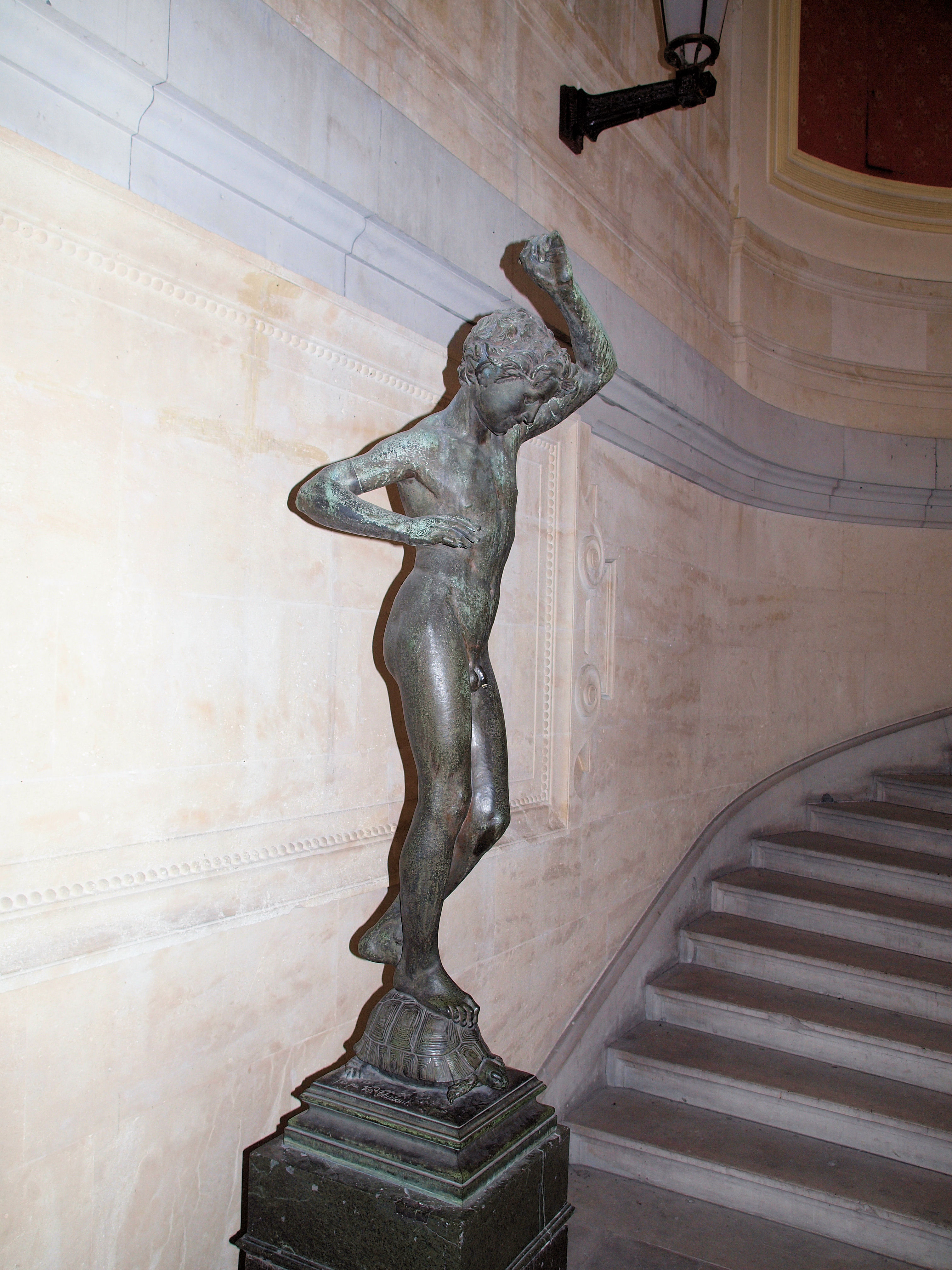 Das Kunstwerk Kind, auf einer Schildkröte reitend 1866, von Eugène Delaplanche (1836-1891) im Treppenhaus des Musée des beaux-art in Marseille